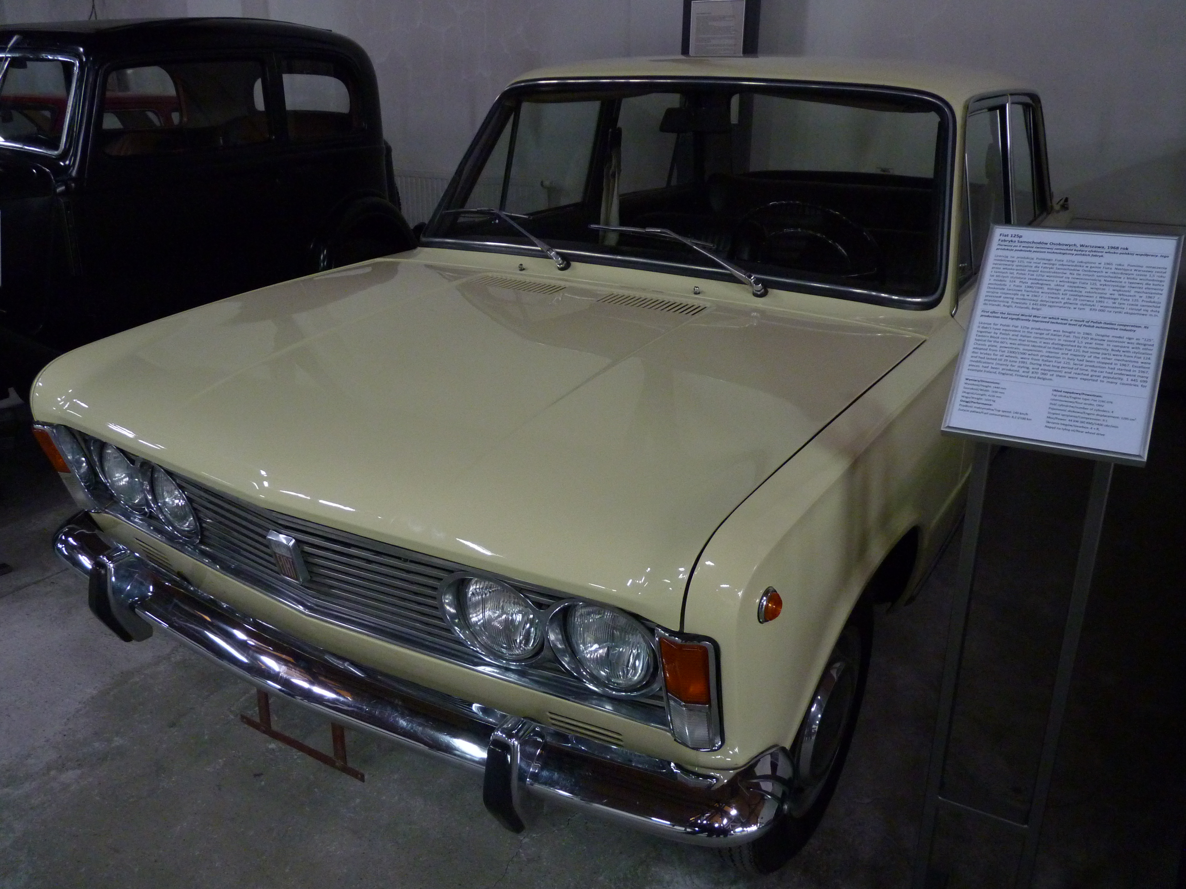 Polski Fiat 125p at the Muzeum Inżynierii Miejskiej in Kraków.JPG